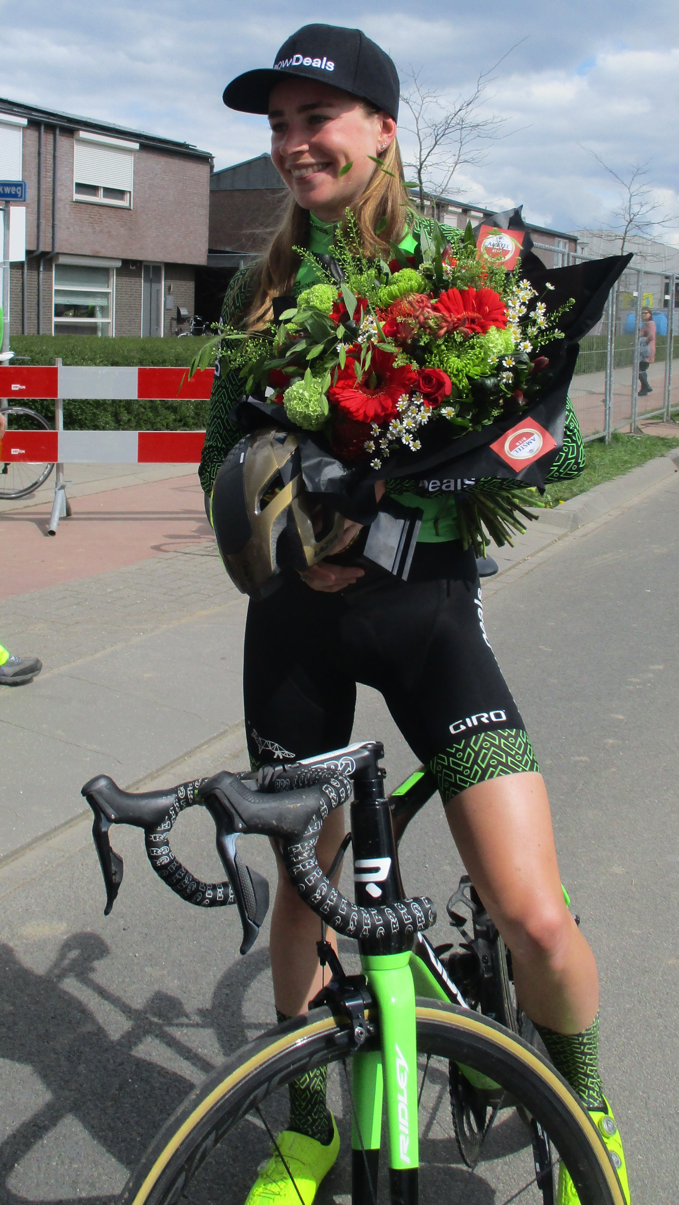 Finish van de Amstel Gold Race Ladies Edition 2018 in Berg, Valkenburg aan de Geul.